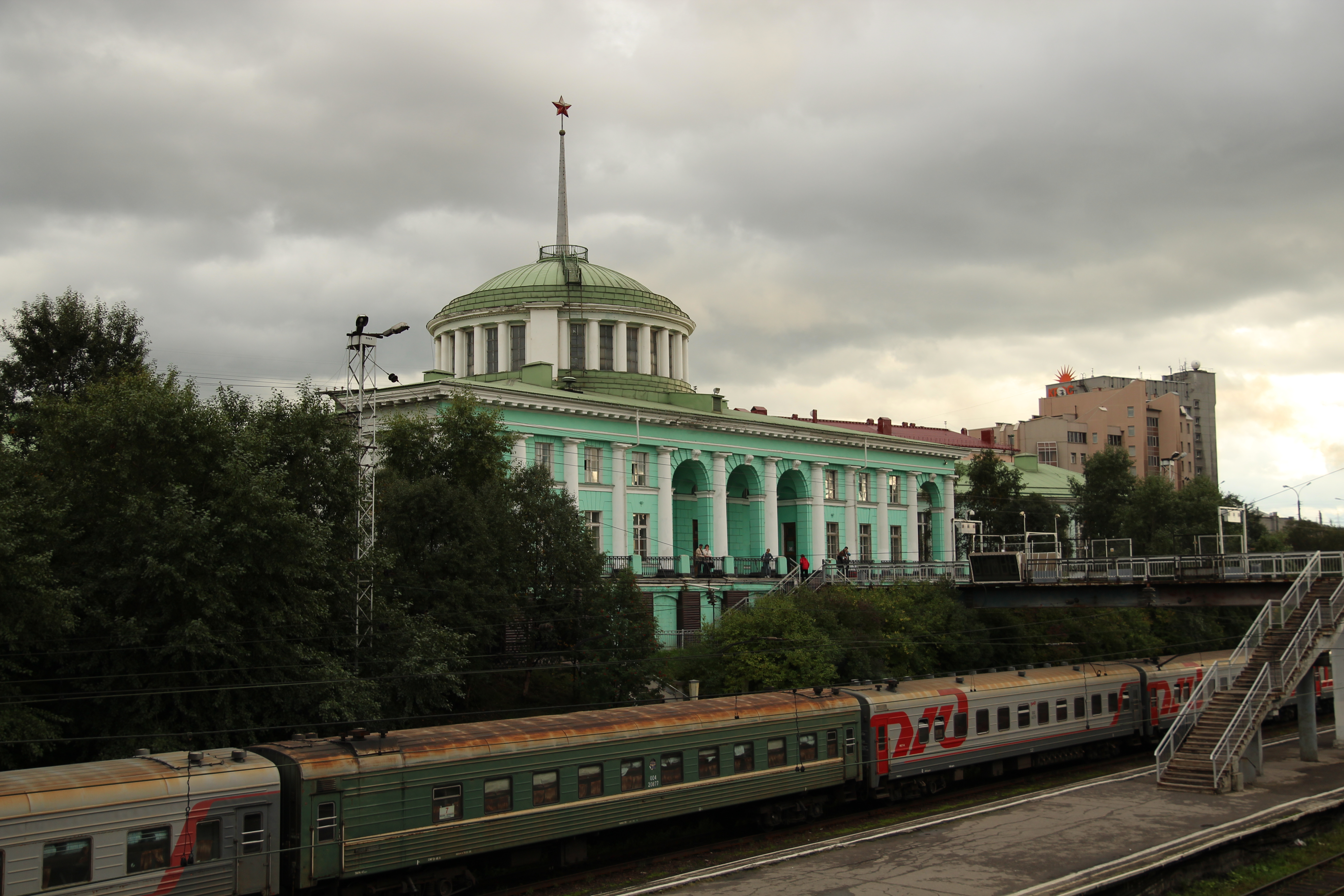 Здание железнодорожного вокзала: улица Коминтерна, 14, Мурманск, Мурманская область